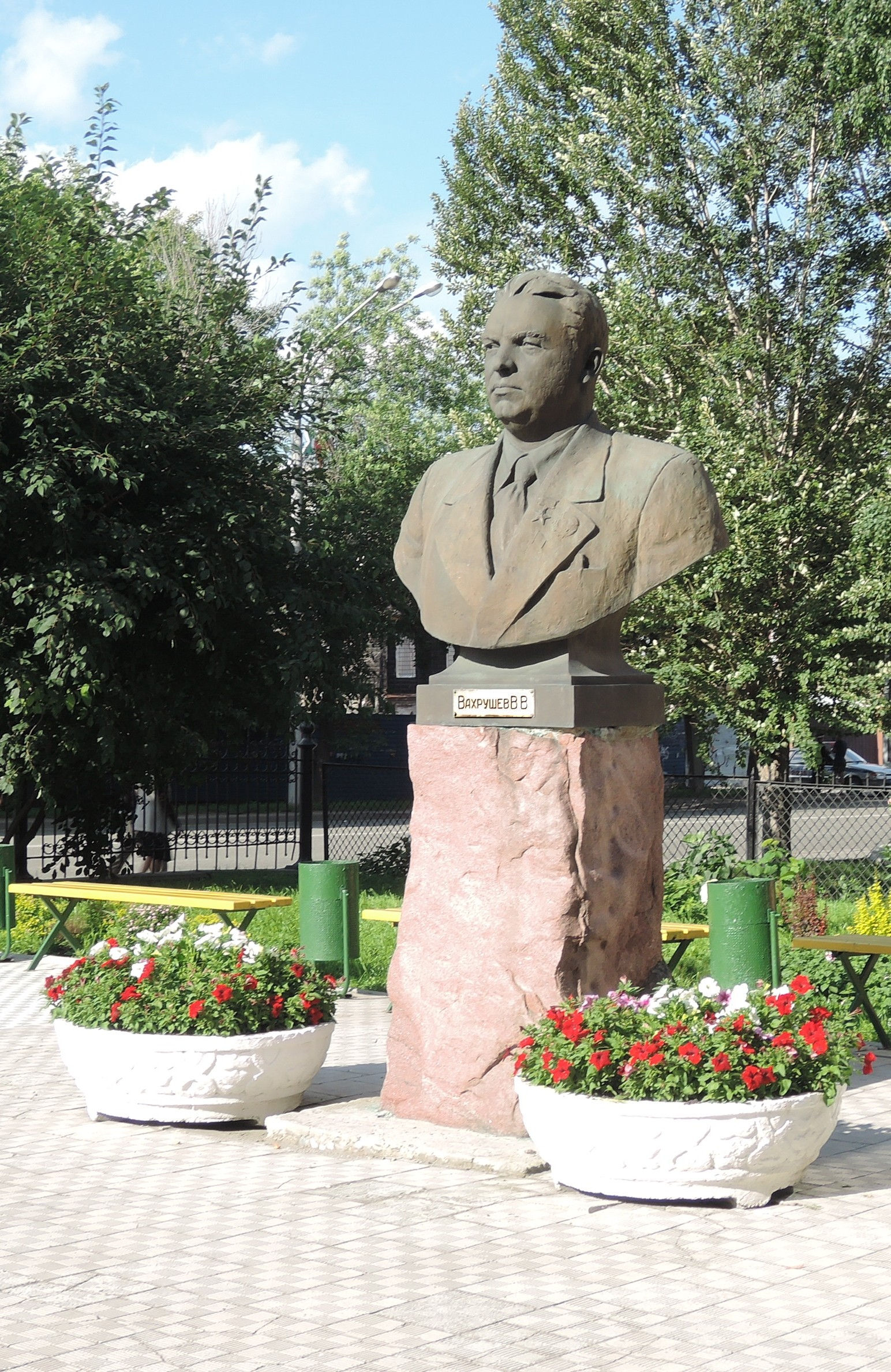 Скульптор Н.В.Томский. Изготовлен на заводе "Монументскульптура", Ленинград. 1948 год. Установлен во дворе первого учебного здания Уральского государственного горного университета в Екатеринбурге, ул. Куйбышева, 30